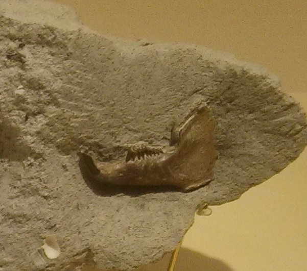 このウサギの下顎化石は国立科学博物館で開催された「日本の哺乳類展」にて展示された個体です。